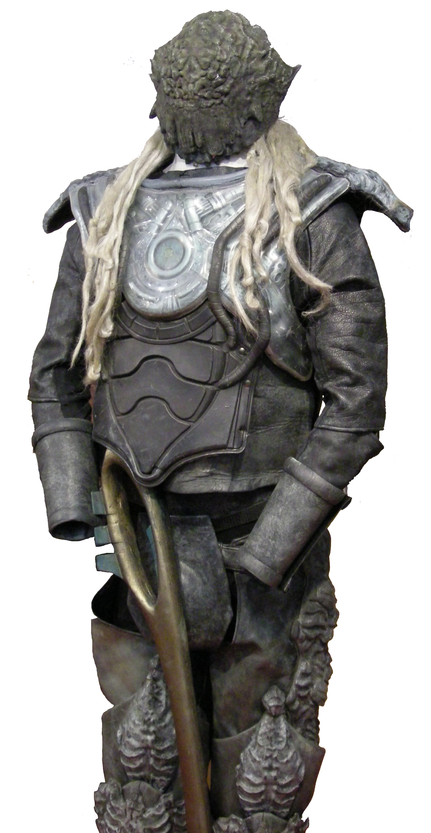 Costume de Wraith (Stargate) au Toulouse Game Show (France) en 2010